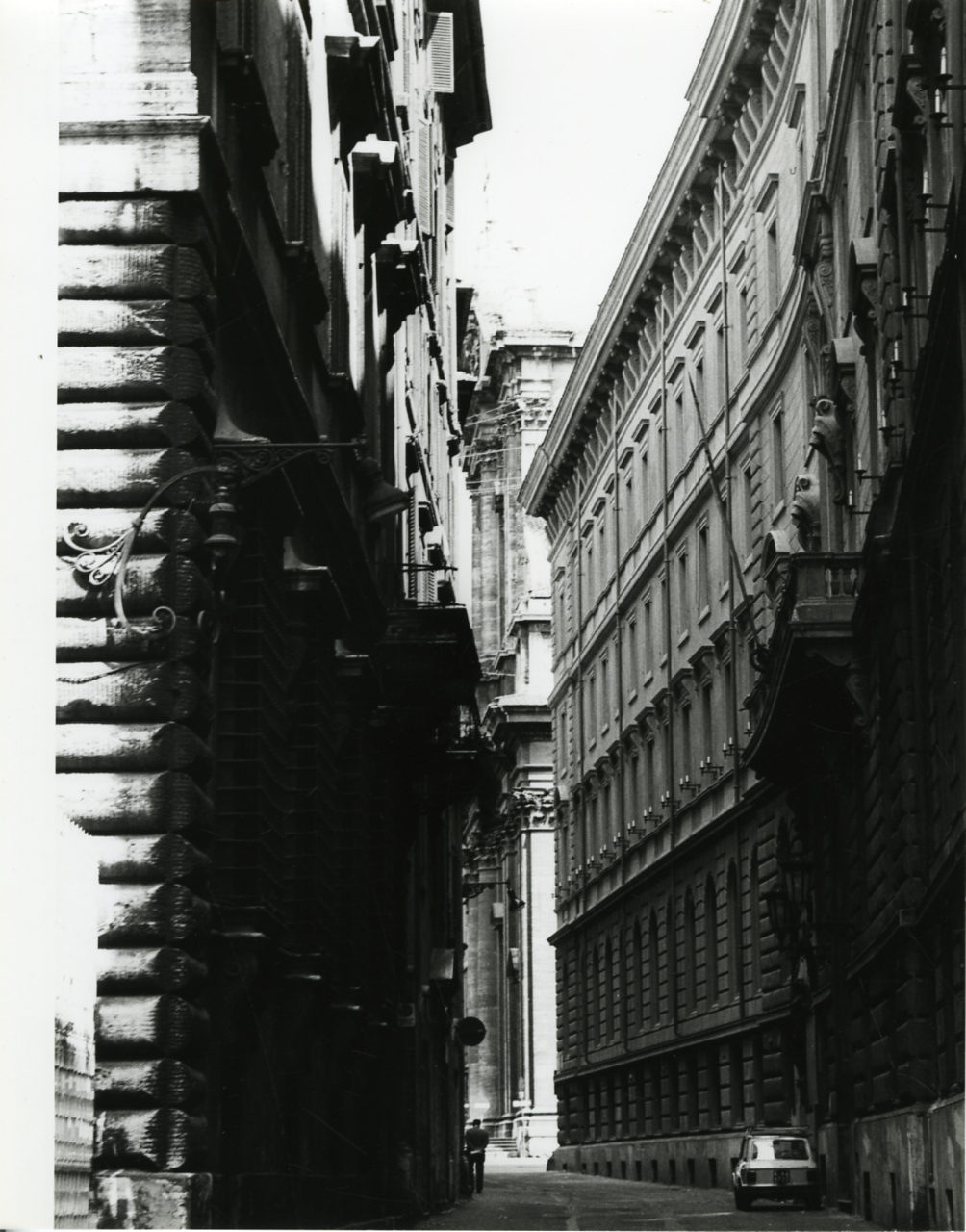 Servizio fotografico : Roma, 1979 / Paolo Monti. - Stampe: 2 : Positivo b/n, gelatina bromuro d'argento/ carta, 24x30. - ((Al verso delle stampe manoscritto numero di negativo corrispondente: 3250/24, 3252/24 e manoscritto: "Via delle Paste (S. Ignazio)", "Via del Seminario (S.Ignazio)". Sul coperchio della scatola manoscritto a pennarello nero: "Roma/ Città storiche". - Occasione: Documentazione per la ubblicazione: Fumagalli, Alberto "Mirabilia Romae: il centro storico nell'arte attraverso i secoli", Milano Cariplo 1979. - Fonte: Agenda di Paolo Monti: Nikon Leika 3001-/ Monti 1978 (1978-1982), presso Archivio Paolo Monti. - Fonte: Fattura di Paolo Monti: IV. Commesse/ Fattura n. 17/ Fotografie centro storico di Roma per Cariplo (1979/06/11), presso Archivio Paolo Monti. - Fonte: Monografia di Fumagalli, Alberto: Mirabilia Romae: il centro storico nell'arte attraverso i secoli, Milano, Cariplo (1979)